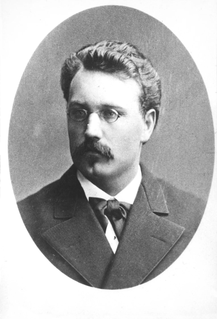 Volmari (Frans Woldemar) Porkka (5. elokuuta 1854 Vehkalahti – 25. joulukuuta 1889 Helsinki) oli suomalainen kielentutkija, yksi aikansa johtavia kansanrunouden ja suomalais-ugrilaisten kielten tutkijoita